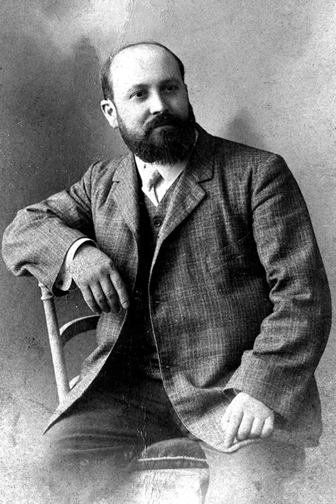 Fotografía de mi album personal. Foto tomada alrededor de 1906.